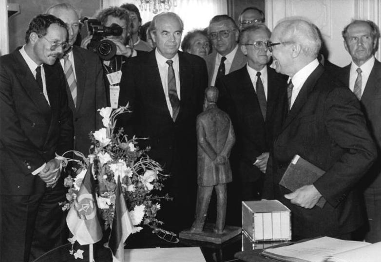 ADN-ZB Zimmermann 9.9.87 BRD: Honecker-Besuch - Der Generalsekretär der ZK der SED und Vorsitzende des Staatsrats der DDR, Erich Honecker, besuchte in Wuppertal das Friedrich-Engels-Haus. Er übergab eine bronzene Engels-Plastik des DDR-Bildhauers Prof. Eberhard Thieme, links der Direktor des historischen Zentrums, Michael Knieriem.